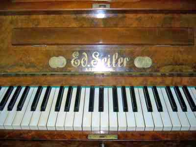 Stare pianino Seiler